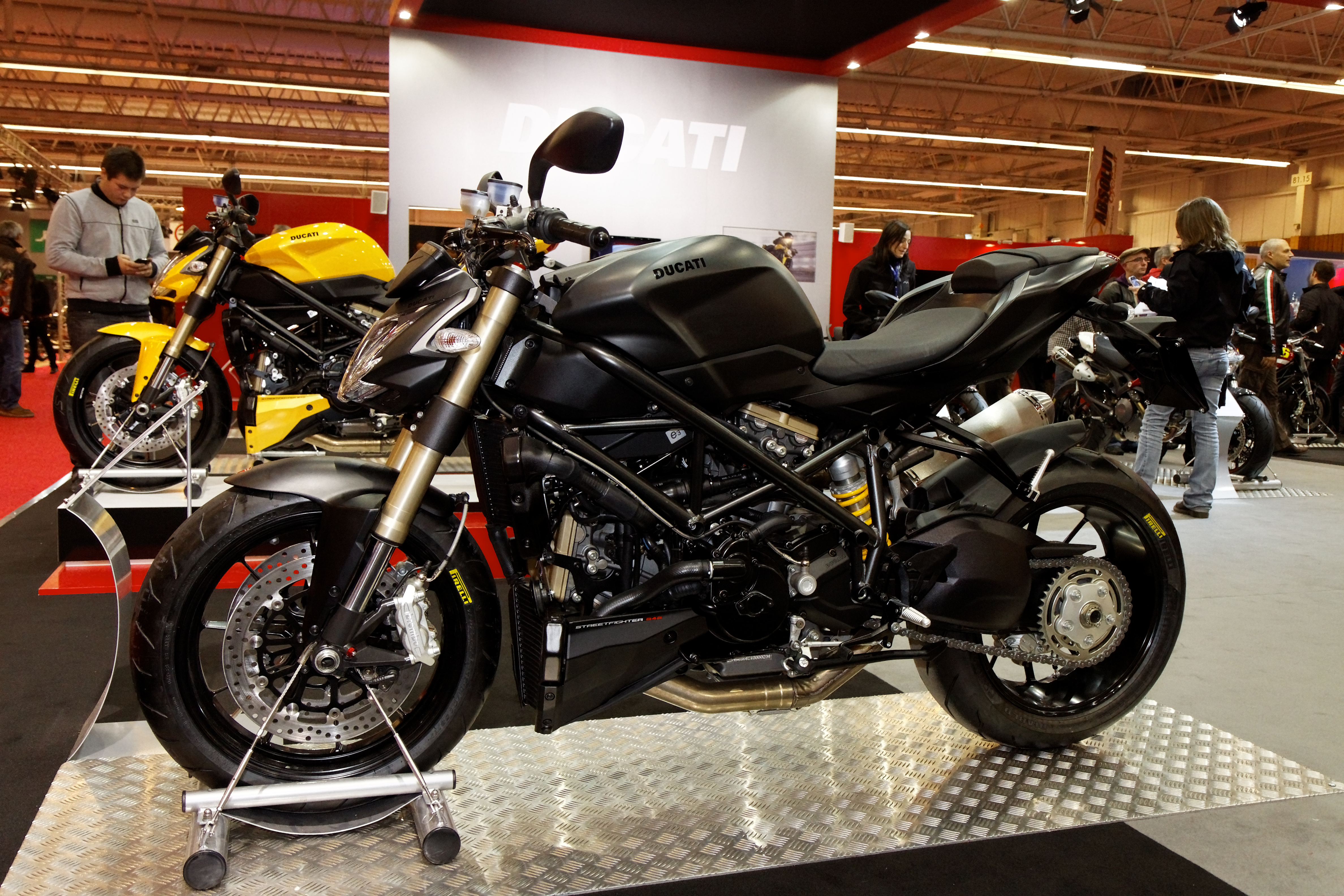 Ducati - Streetfighter 848